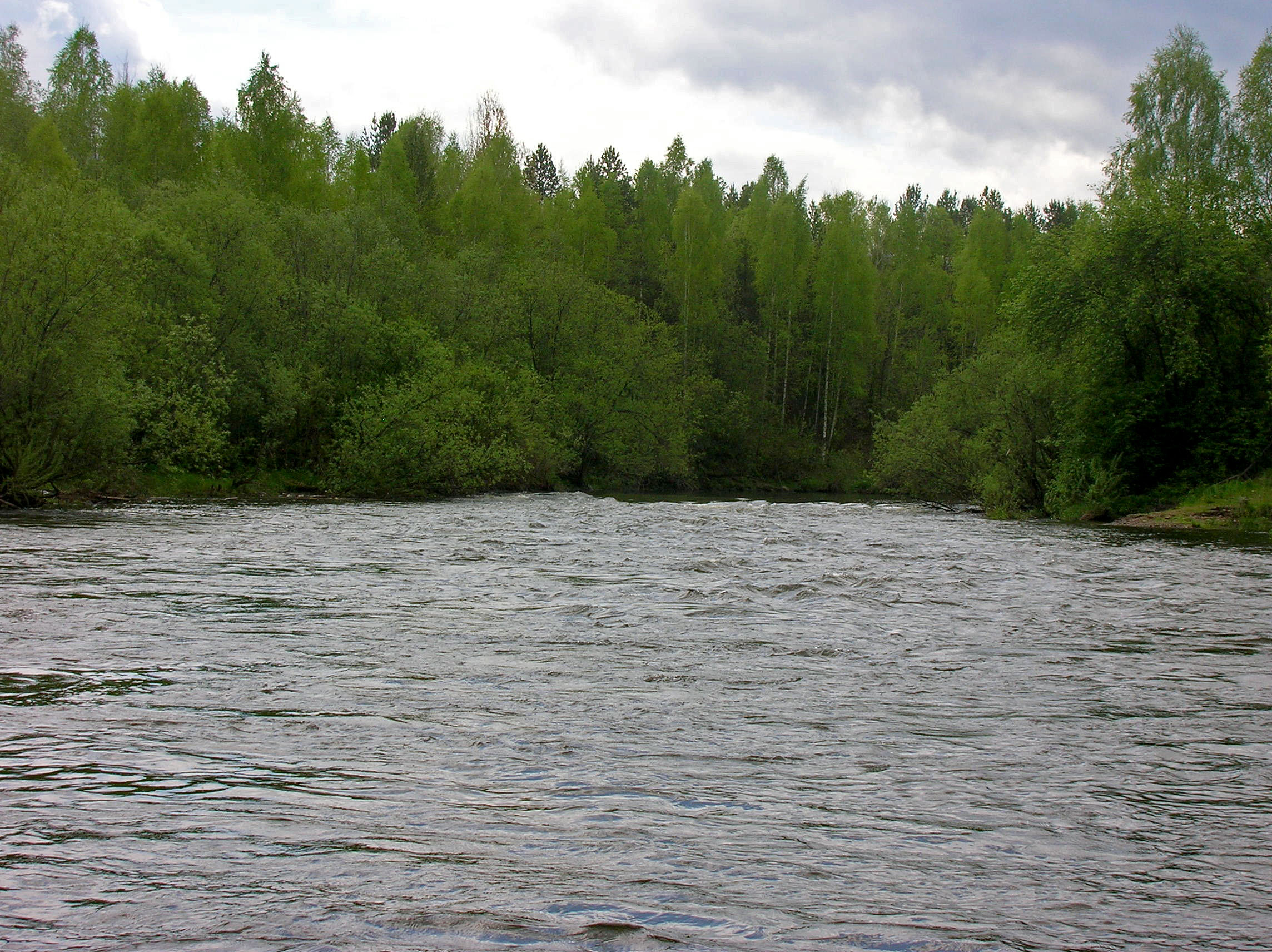 g. Nizhnyaya Tura, Sverdlovskaya oblast', Russia